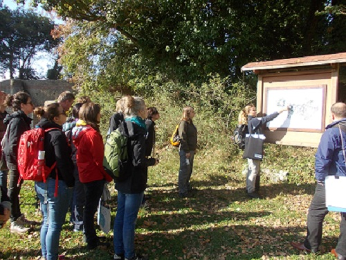 Παρακολουθώντας μία ξενάγηση στο Circeo National Park, της Ιταλίας